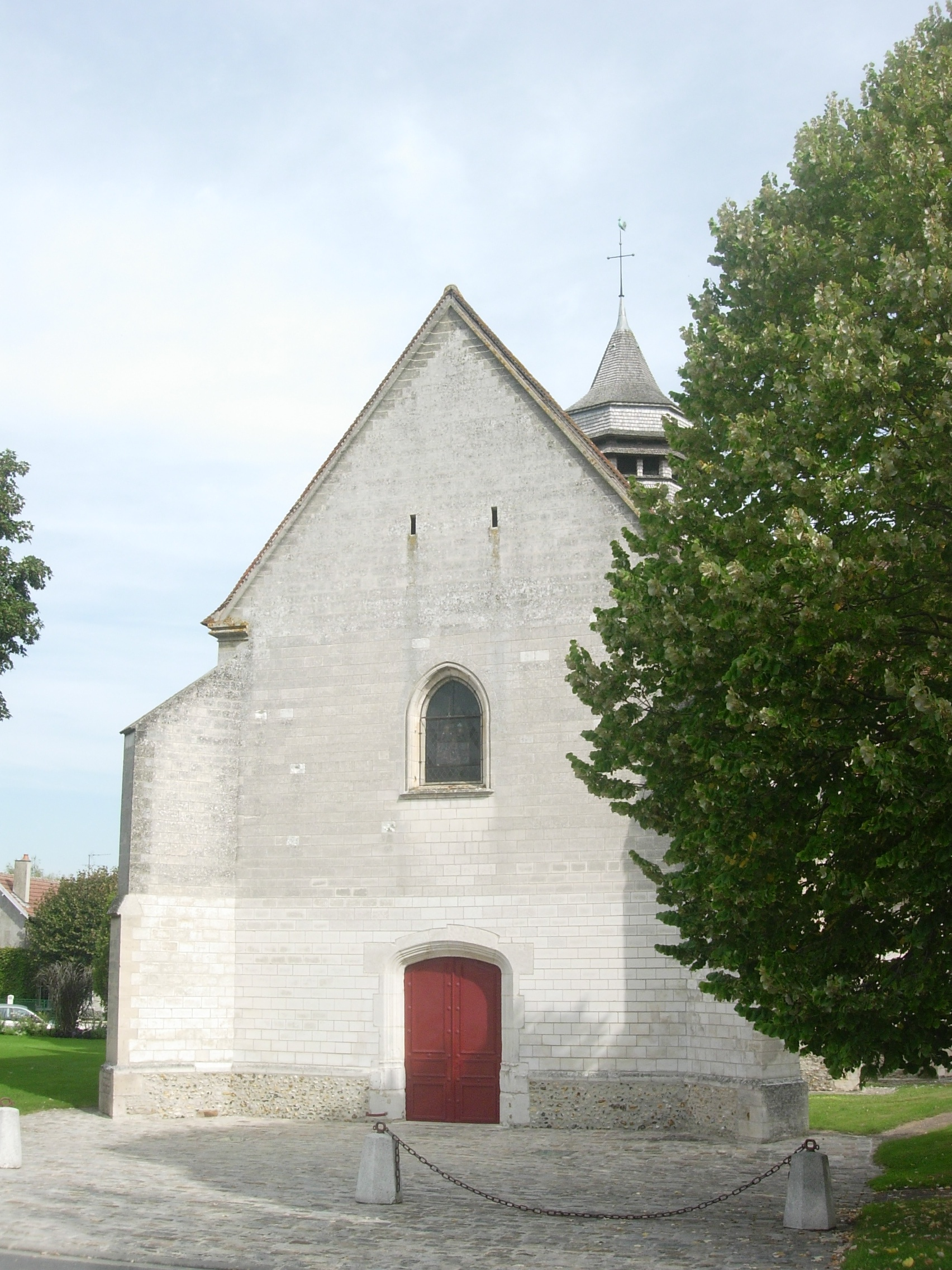 Eglise de La Chapelle-Saint-Luc